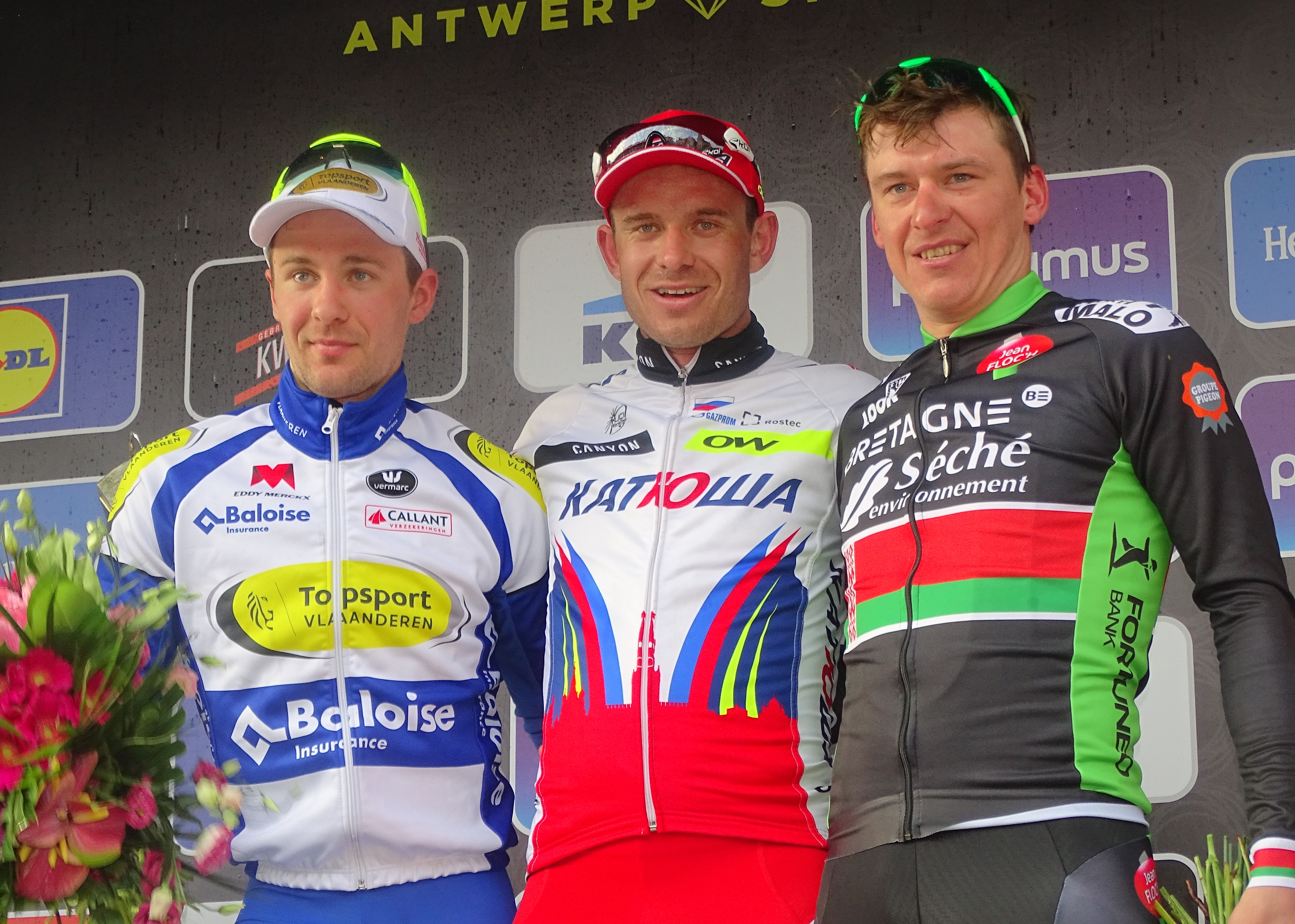 Reportage réalisé le mercredi 8 avril à l'occasion de l'arrivée du Grand Prix de l'Escaut 2015 à Schoten, Belgique.